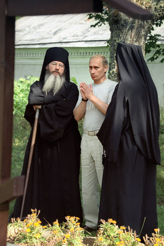 КАРЕЛИЯ. С игуменом Валаамского Спасо-Преображенского монастыря епископом Панкратием (слева).